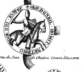 Jean I de Chalon-Auxerre